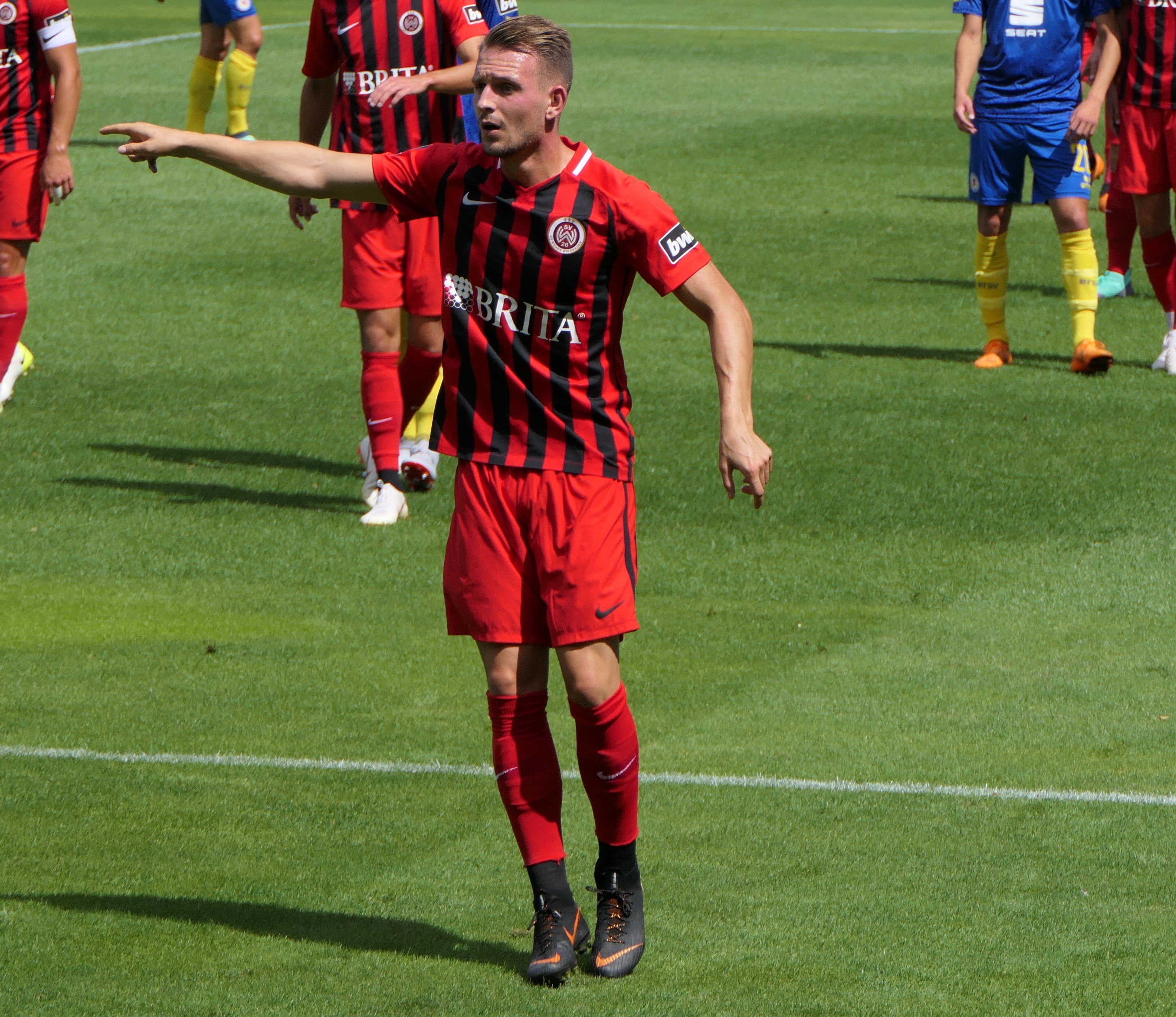 Der Fussballprofi Marc Wachs im Trikot von Wehen Wiesbaden beim Heimspiel gegen Eintracht Braunschweig am 11.08.2018.